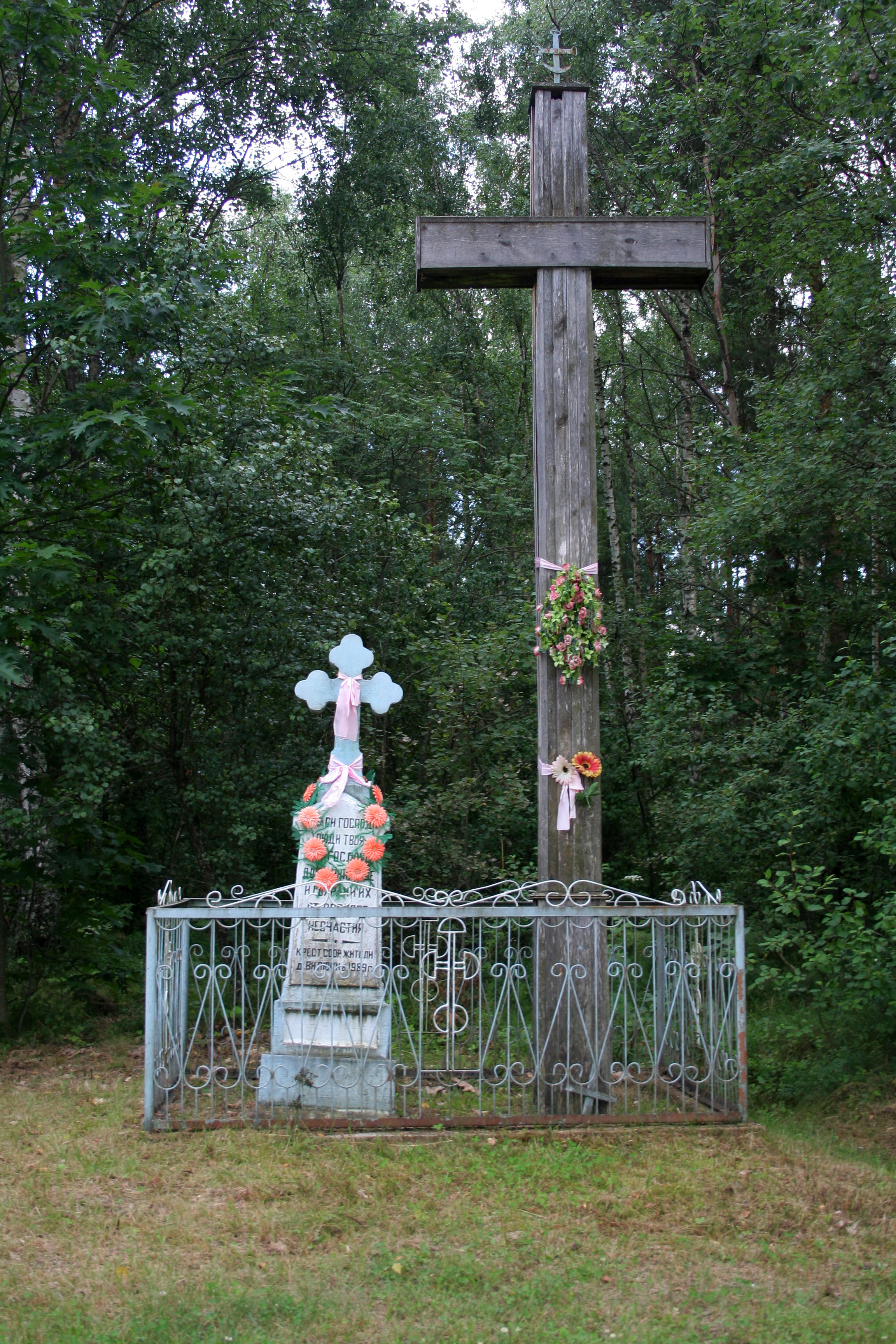 Krzyże przydrożne w Wilukach.